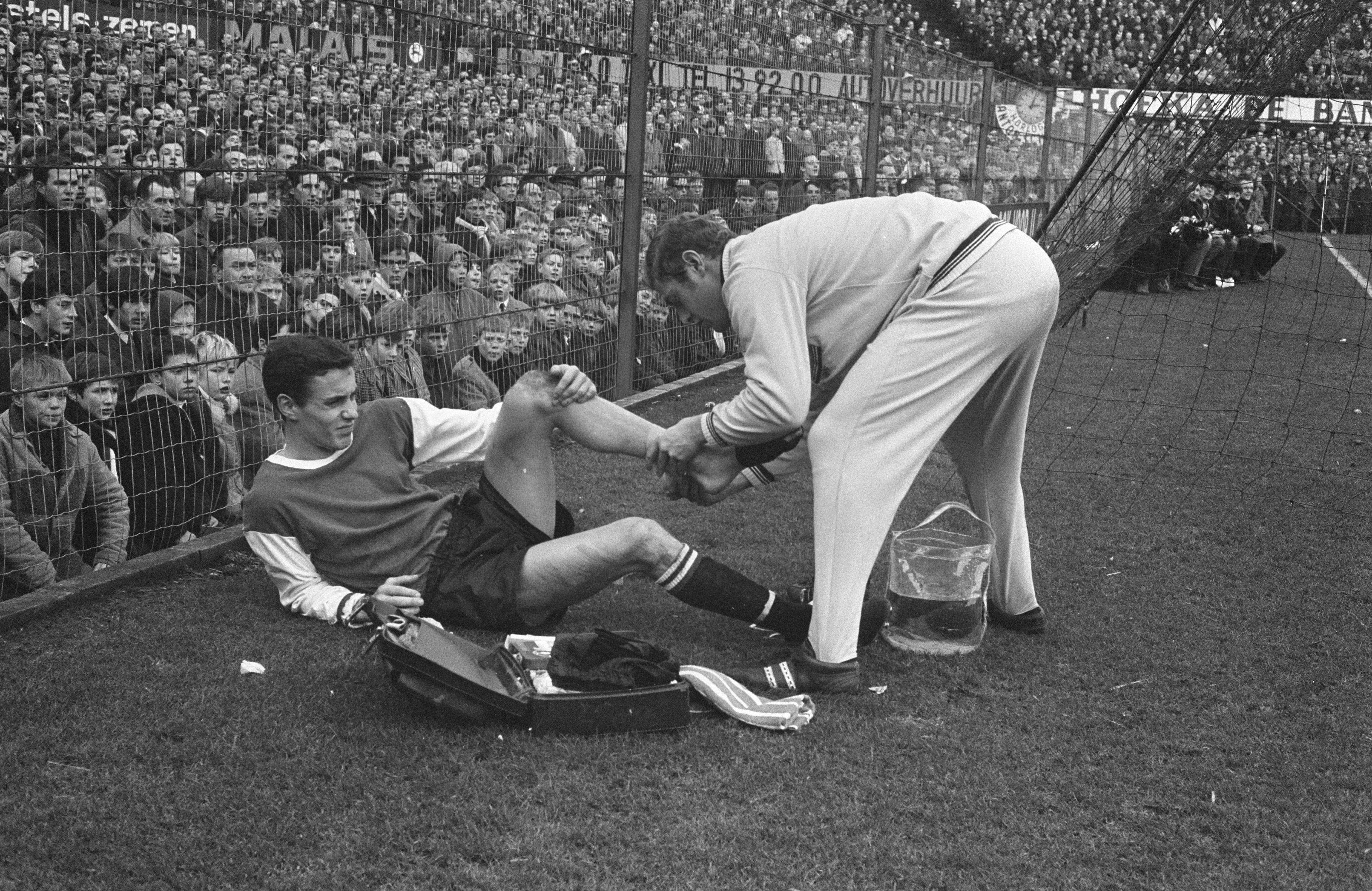 Collectie / Archief : Fotocollectie Anefo Reportage / Serie : [ onbekend ] Beschrijving : Feyenoord tegen DWS 4-0. Kindvall langs de lijn, wordt hier geholpen door verzorger Gerard Meijer Datum : 26 december 1967 Locatie : Rotterdam, Zuid-Holland Trefwoorden : sport, verzorgers, voetbal Persoonsnaam : Kindvall, Ove, Meijer, Gerard Instellingsnaam : Feyenoord Fotograaf : Koch, Eric / Anefo Auteursrechthebbende : Nationaal Archief Materiaalsoort : Negatief (zwart/wit) Nummer archiefinventaris : bekijk toegang 2.24.01.05 Bestanddeelnummer : 920-9493